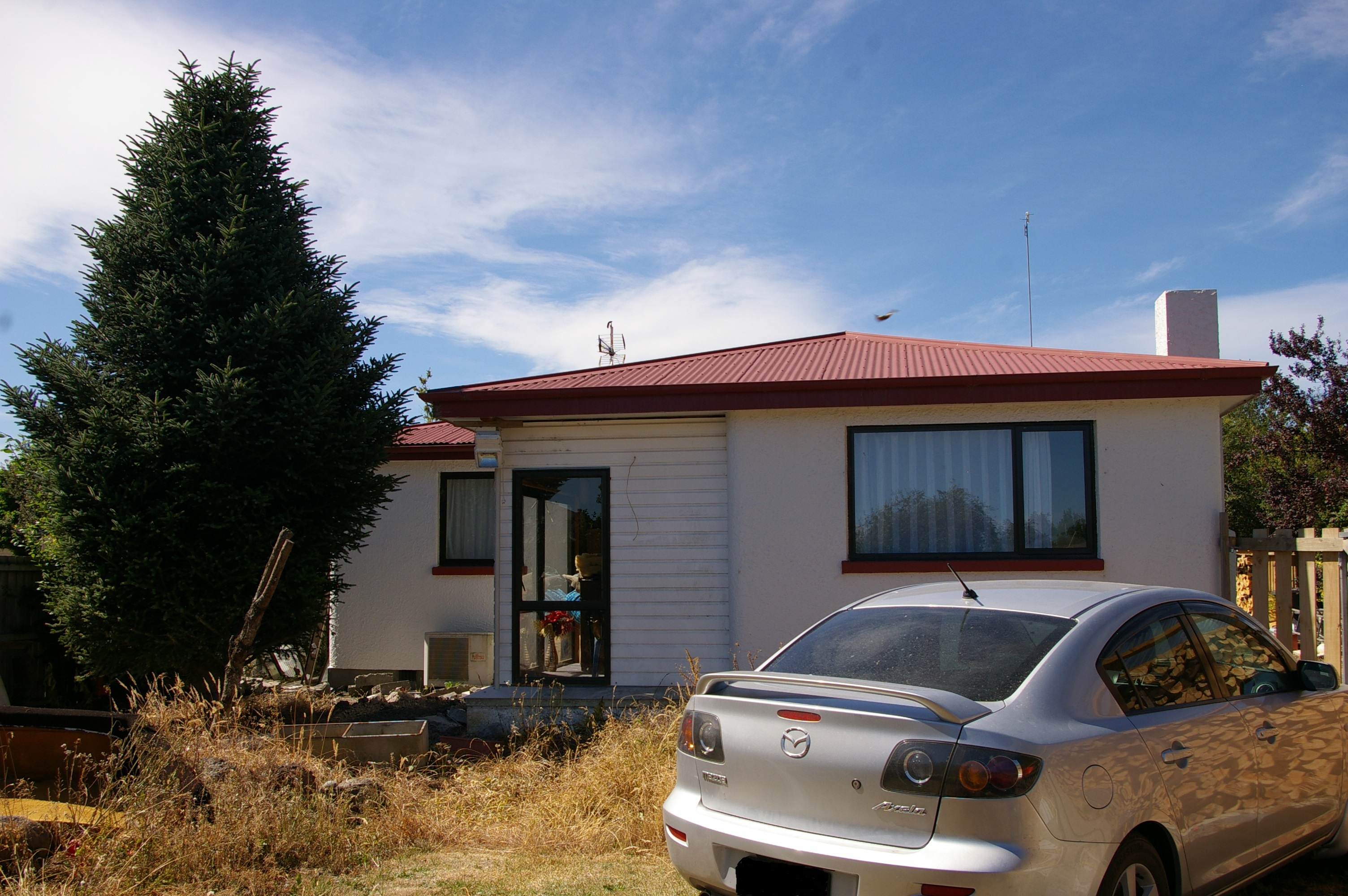 Wohnhaus des Premierministers Norman Kirk